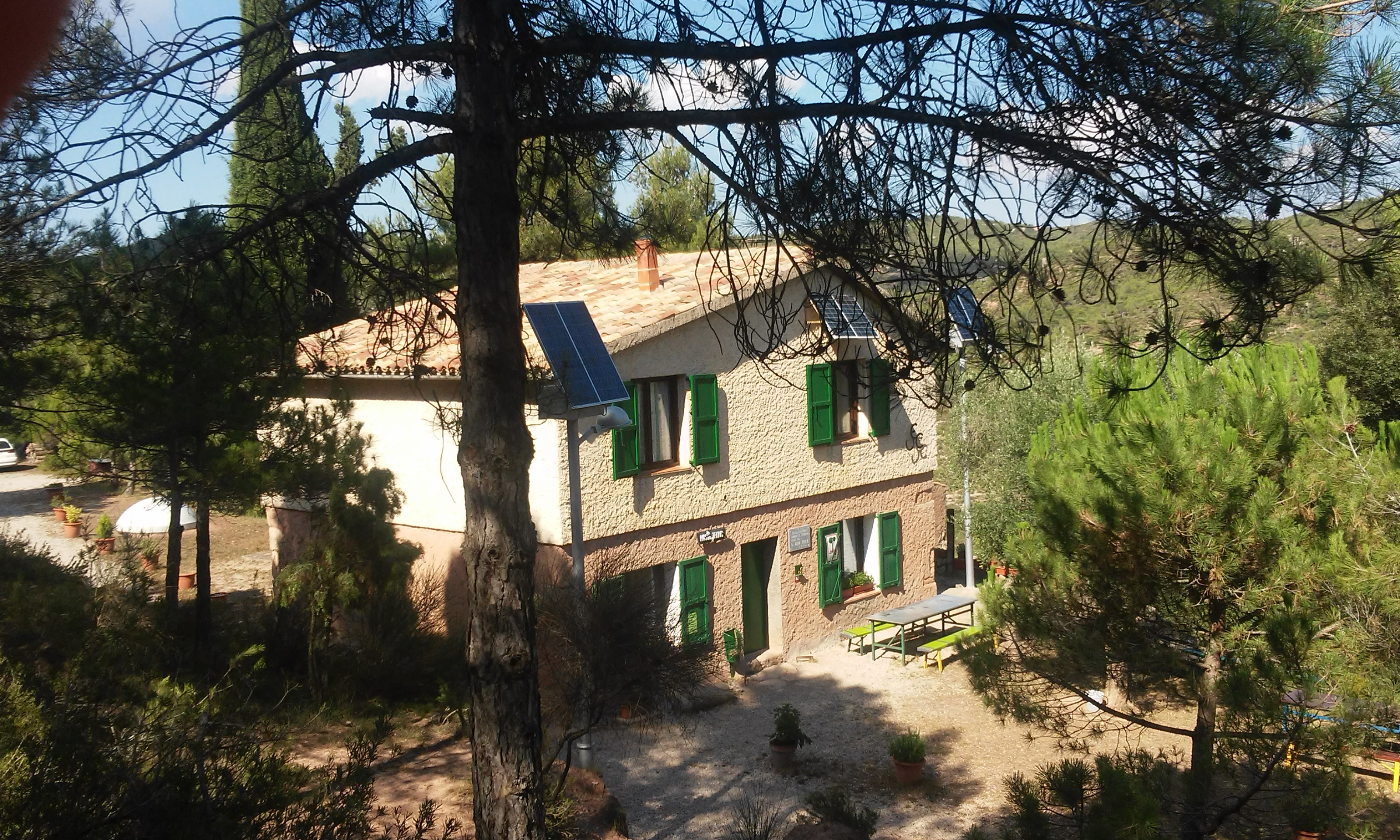 Fotografia del refugi Mas del Tronc, el 2 d'agost de 2015.